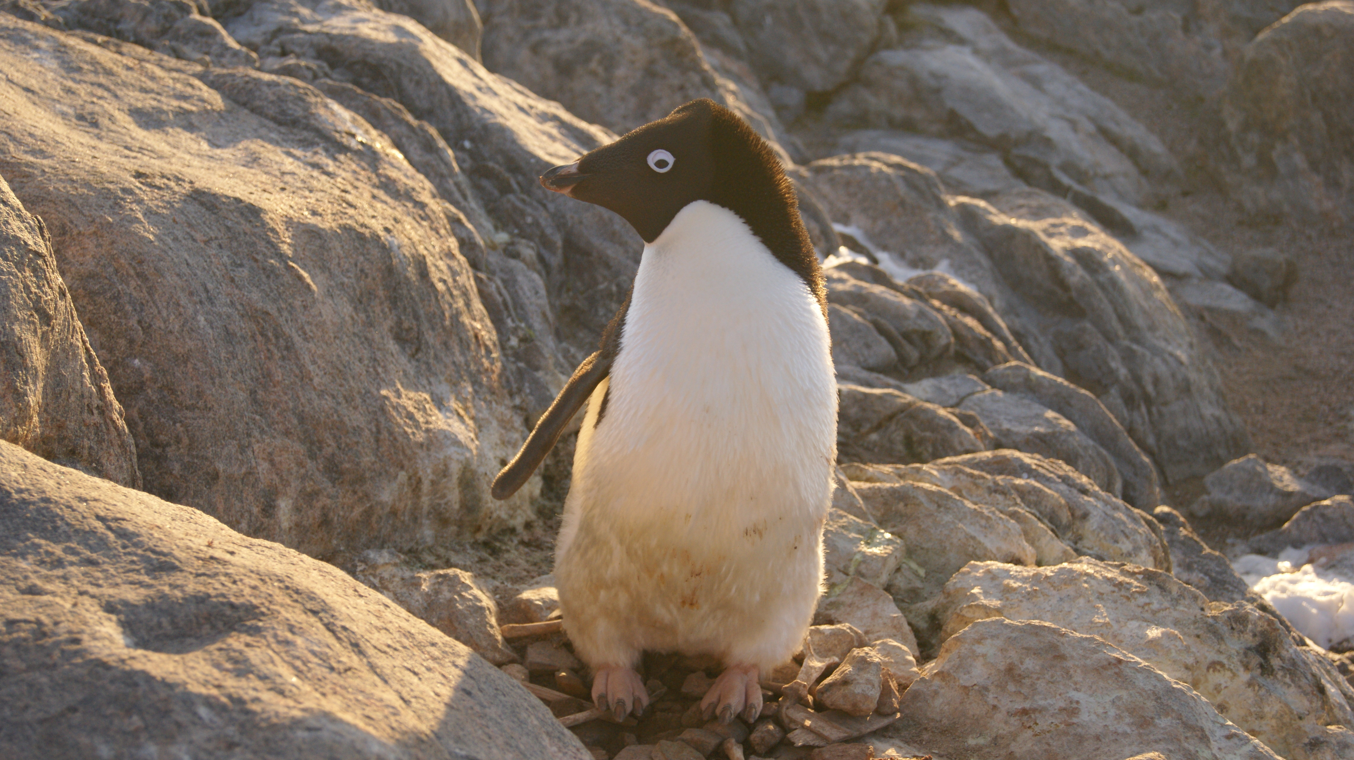 Manchot Adélie. Base Dumont d'Urville, Terre Adélie.